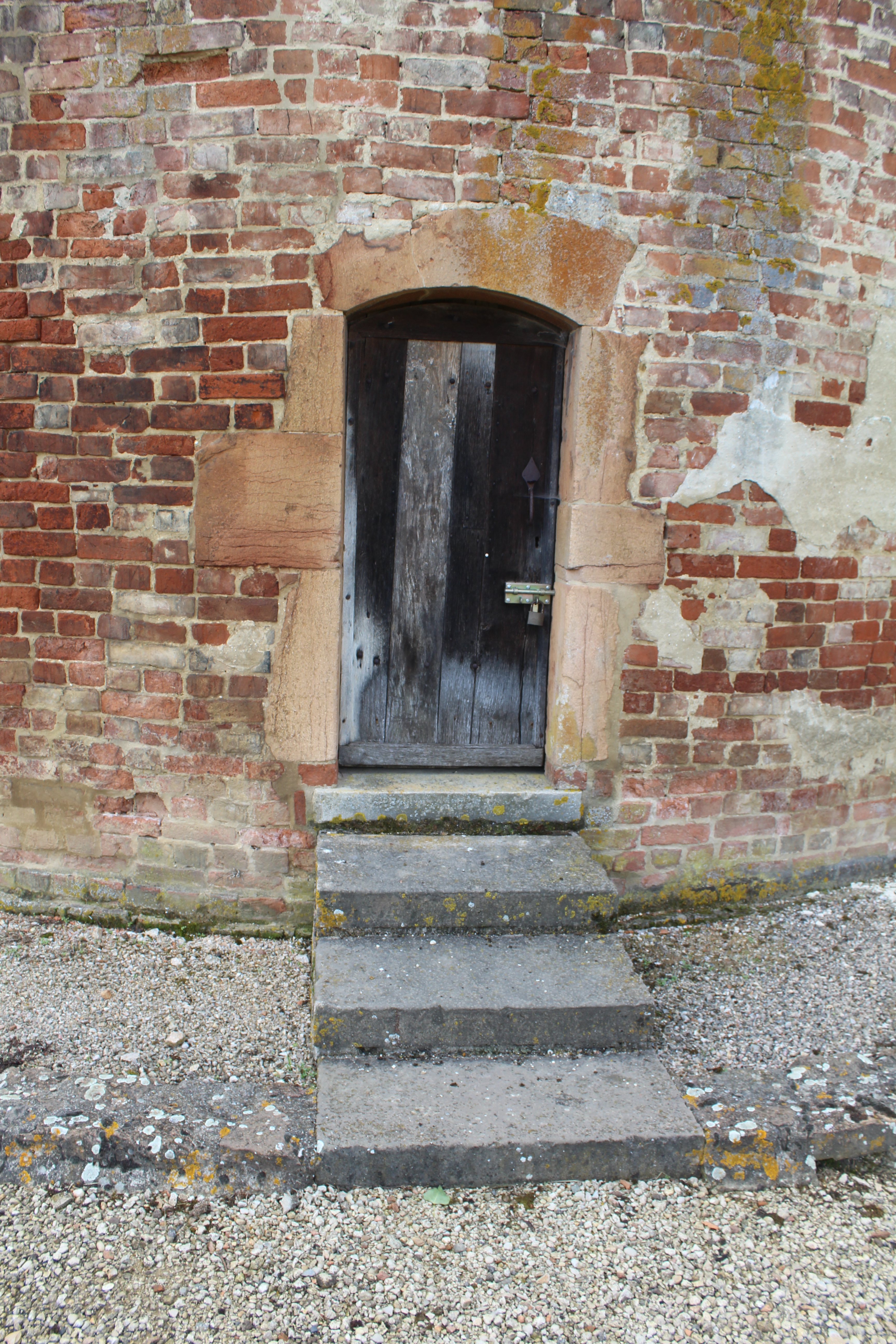 Entrée dans le pigeonnier circulaire de l'ancien château à Perrex.